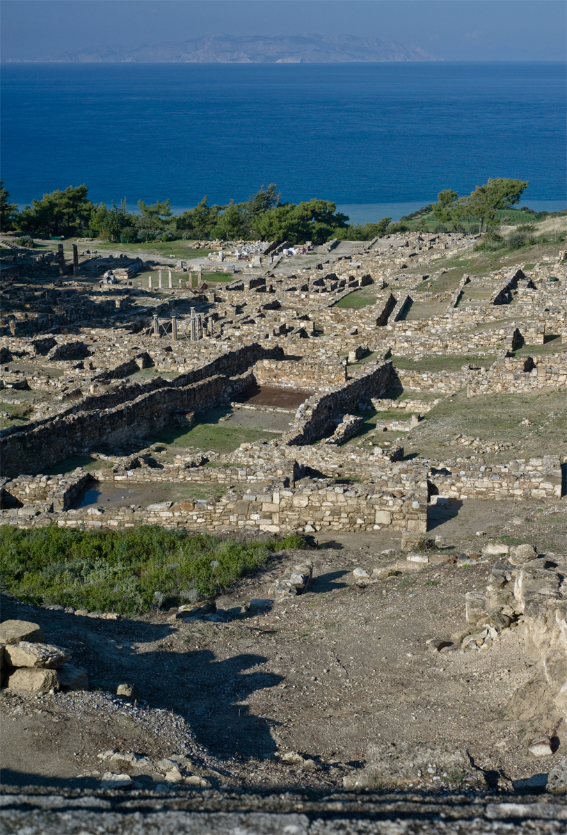 Αρχαία Κάμειρος